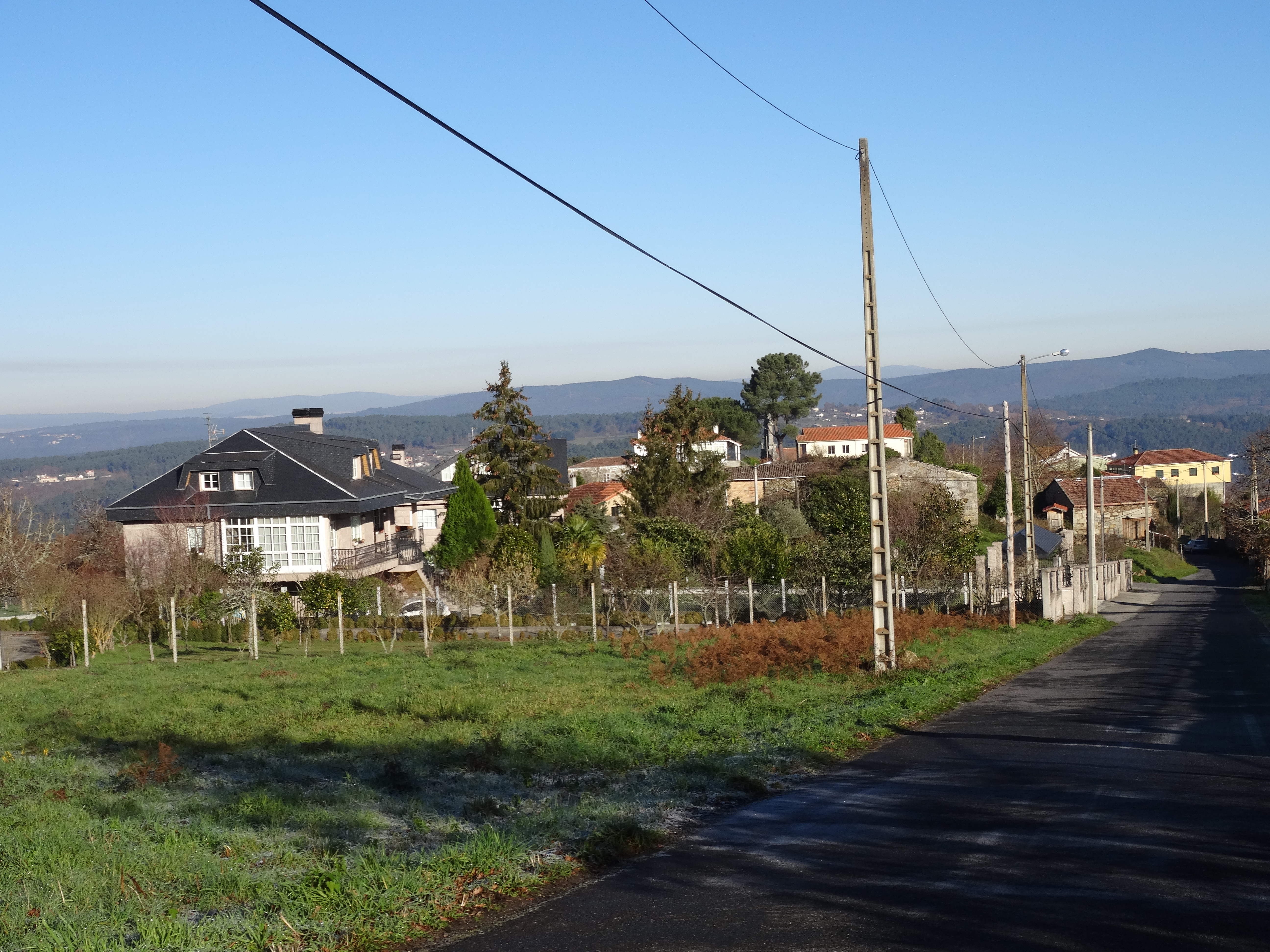 Ver título.